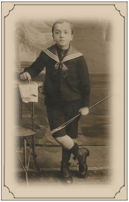 Çocukluk yıllarında Bahriyeli Necip Fazıl Kısakürek, 1916.